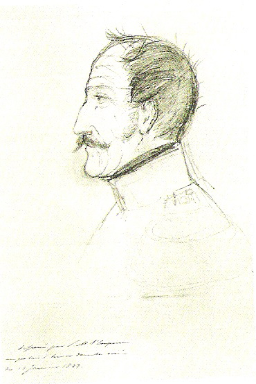 Николай I, император. Автопортрет. 1843. Бумага, карандаш. Под изображением слева надпись карандашом: "Dessine раг 8. М. l Empereur au palai(s)) d hiver dans la soiree du 15 janvier 1843" ("Рисовано Е. И. Величеством в Зимнем дворце на вечере 15 января 1843"). Институт русской литературы ("Пушкинский дом") РАН.